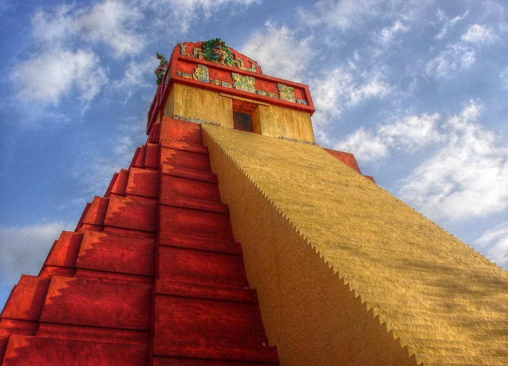 R�plica del templo maya de Tikal. Est� ubicada en el parque Xetulul